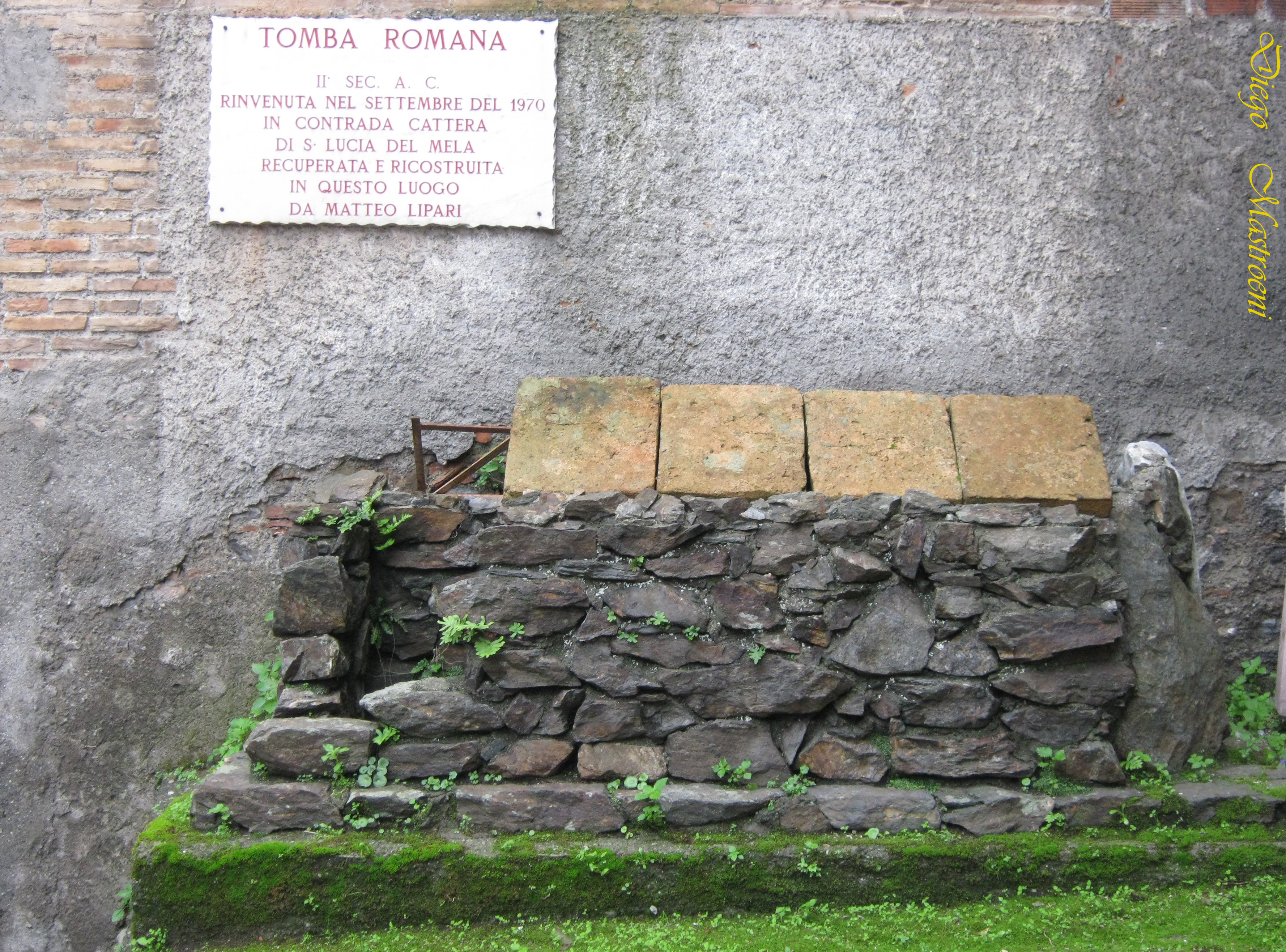 Santa Lucia del Mela, Roman Tomb